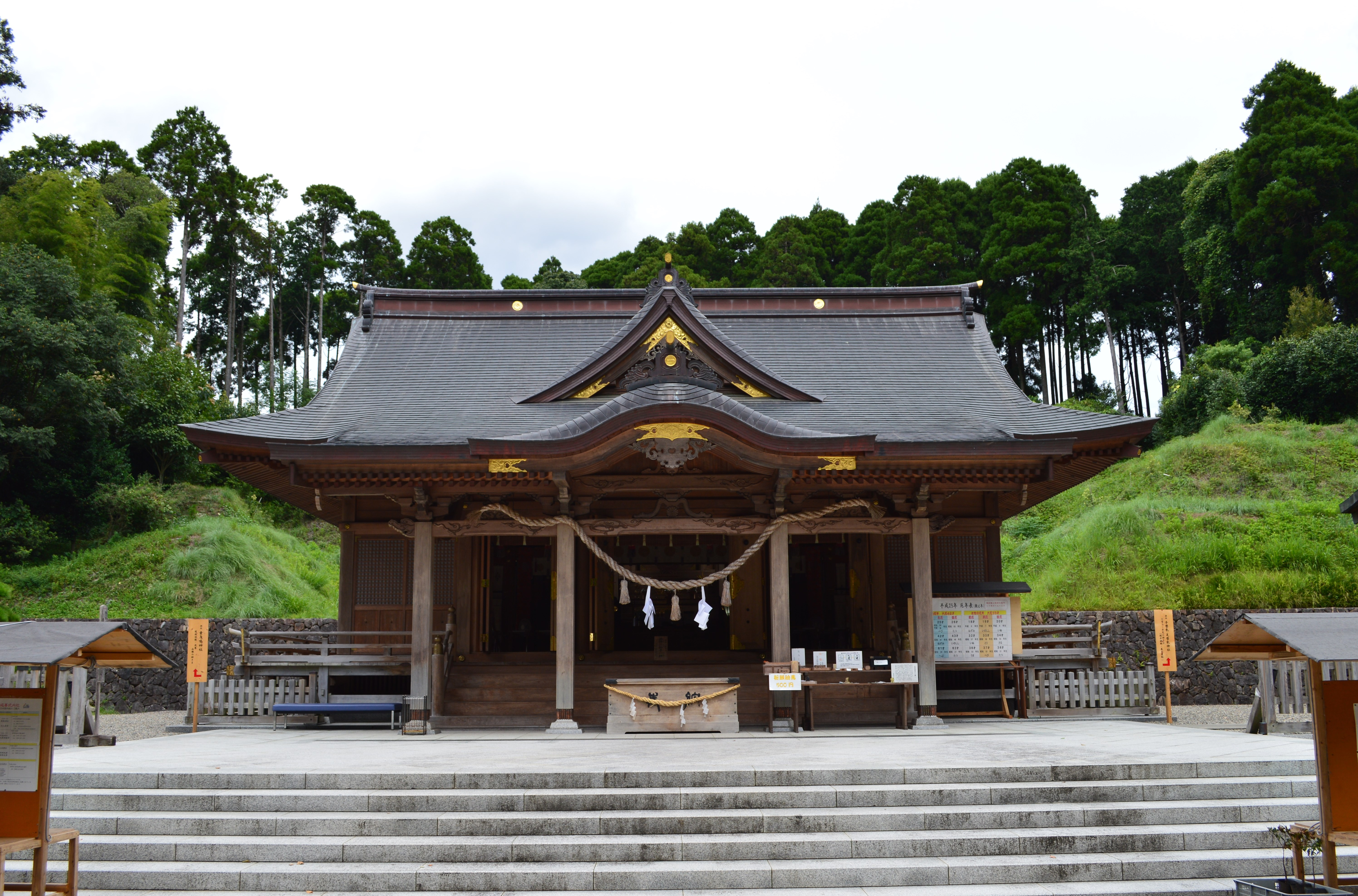 都農神社 拝殿